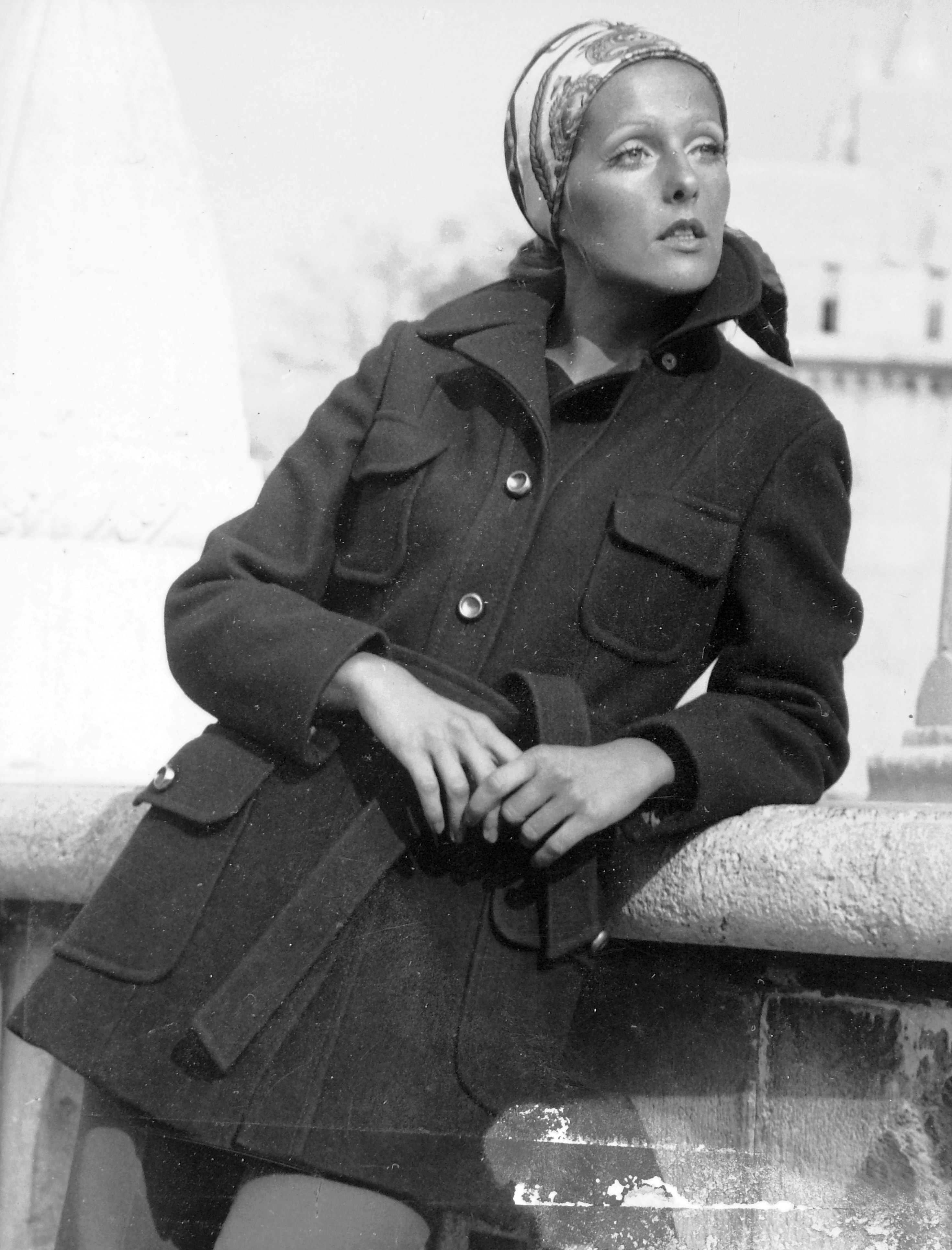 Pataki Ági